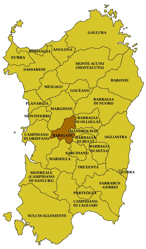 Sardinian Subregions